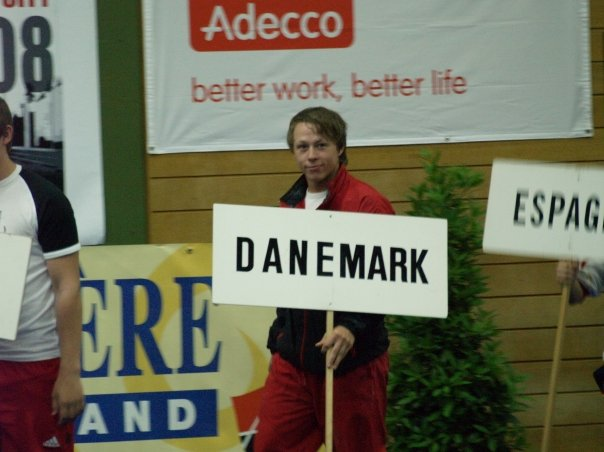 Tim Kring, Promotion Cup 2008, Lausanna, Schweiz.